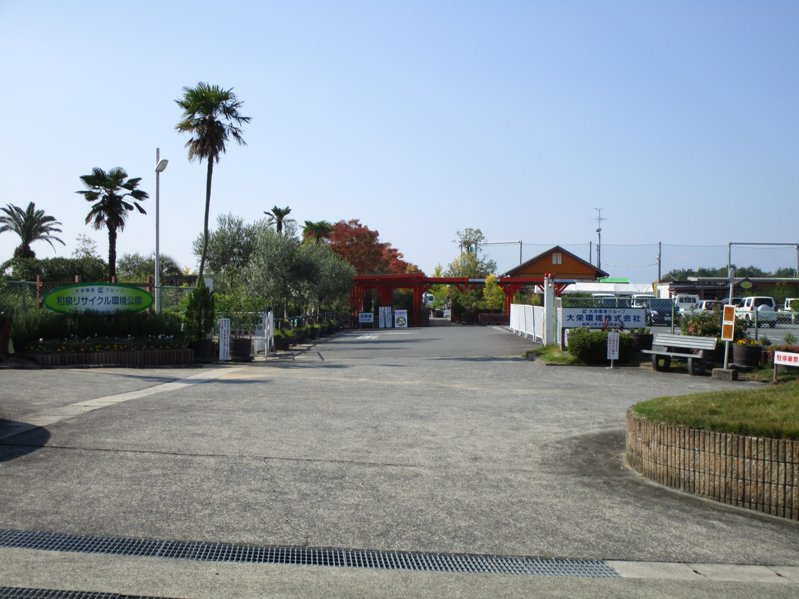 和泉リサイクル環境公園入り口